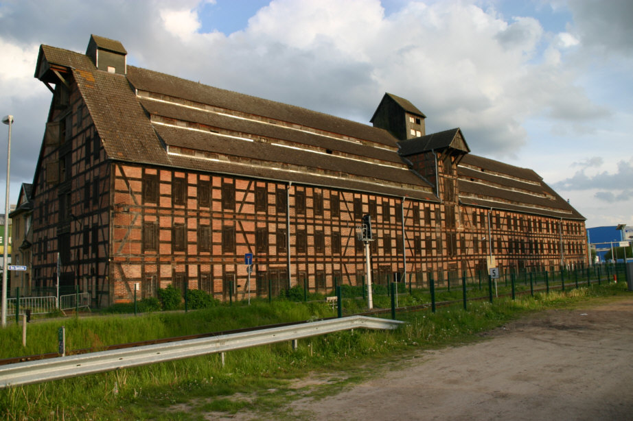 Der alte Kornspeicher (bzw. Getreidespeicher, Fachwerkspeicher oder auch Homeyer-Speicher) war ein imposanter Fachwerkbau im Stadthafen von Wolgast. In ihm (und seinem Nachbarbau von 1836) sollen die letzten Steine des Wolgaster Schlosses verbaut worden sein. Der in unmittelbarer Nähe zur Peene-Werft stehende, 1843 für den Getreidegroßhändler Wilhelm Homeyer errichtete Speicher wurde in der Nacht vom 6. zum 7. Juni 2006 durch einen auf Brandstiftung beruhenden Großbrand vollständig zerstört.